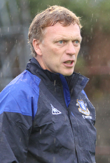 Дэвид Мойес